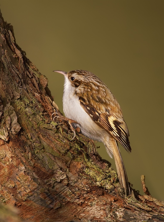 Certhia familiaris, Konicko, Litovelské pomoraví, CZ